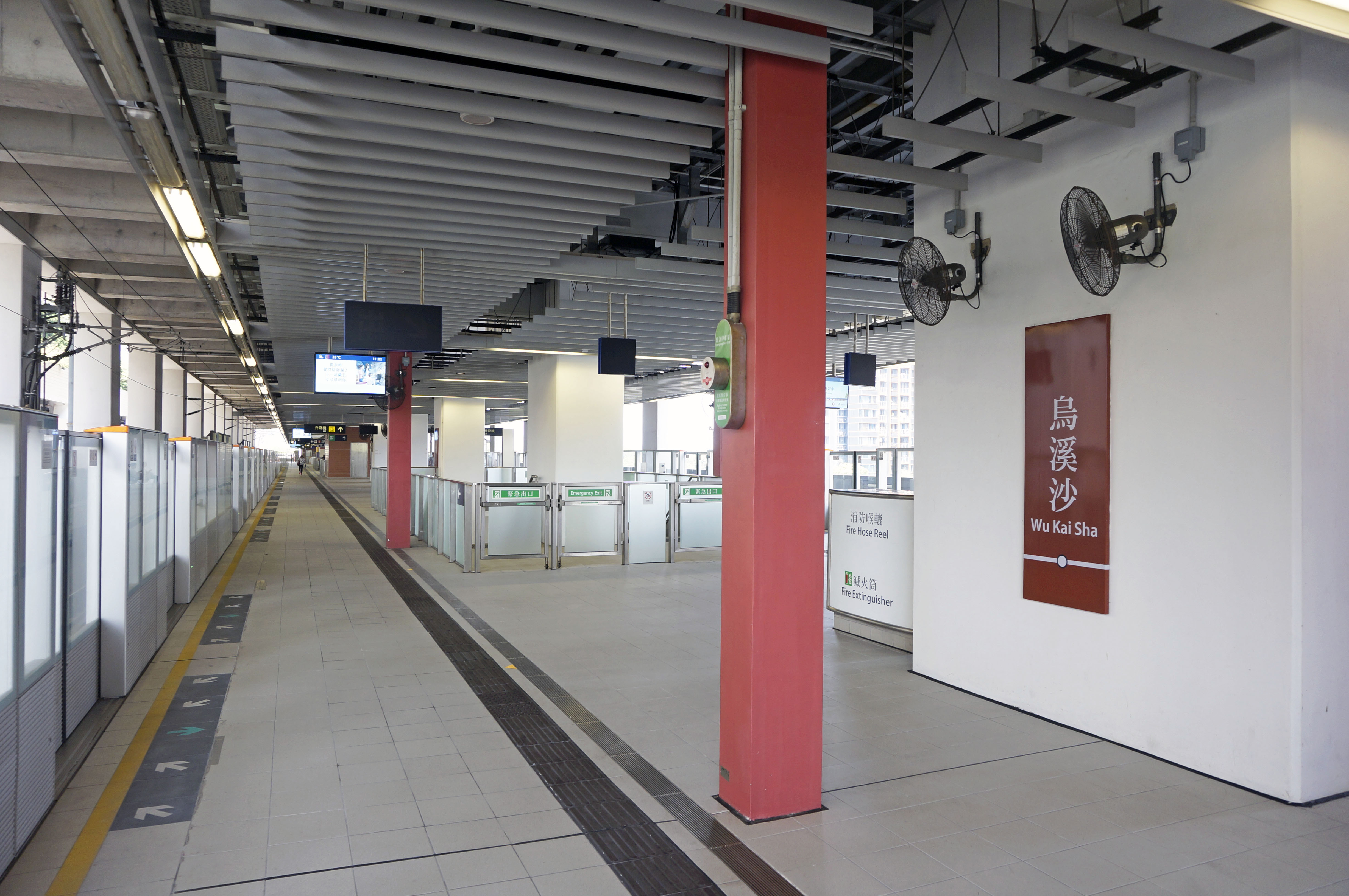 港鐵烏溪沙站月台